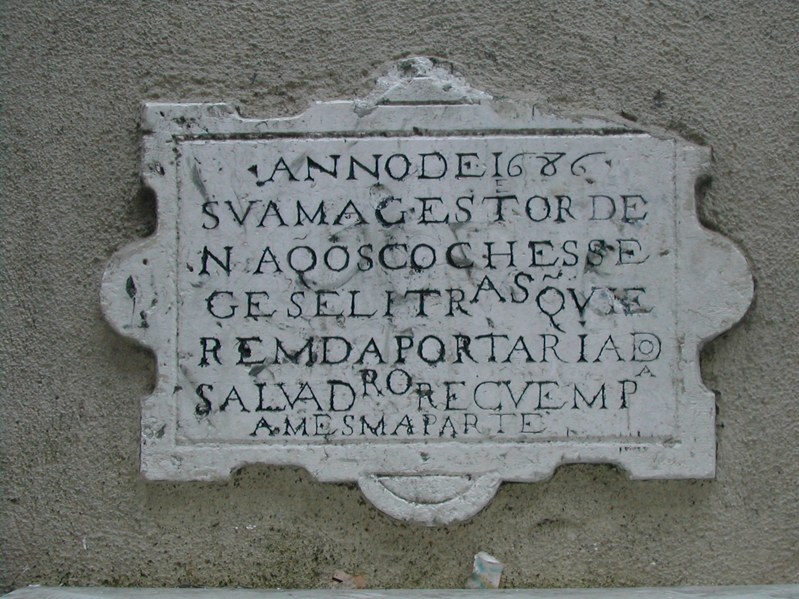 Sinal de trânsito do século XVII, Salvador, Alfama, Lisboa, Portugal